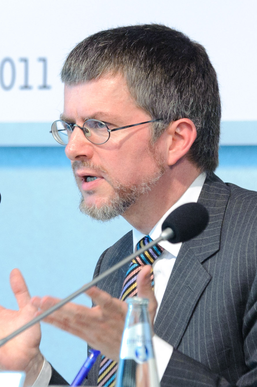 Patrick Bahners (Verantw. Redakteur für Feuilleton, FAZ, Frankfurt)